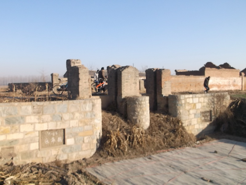 滏阳河西八闸位于邯郸永年城西大慈村至田堡村之间的滏阳河北岸，是明代修建的八处水利设施，因在永年城关以西，故俗称“西八闸”。西八闸的排列次序按地理位置自西向东分为一至八闸：广仁闸、普惠闸、便民闸、济民闸、广济闸、润民闸、惠民闸、阜民闸。至今仍在使用的有二、四、六、七、八这五座闸；一、三、五闸已废弃。2013年5月公布第七批全国重点文物保护单位。